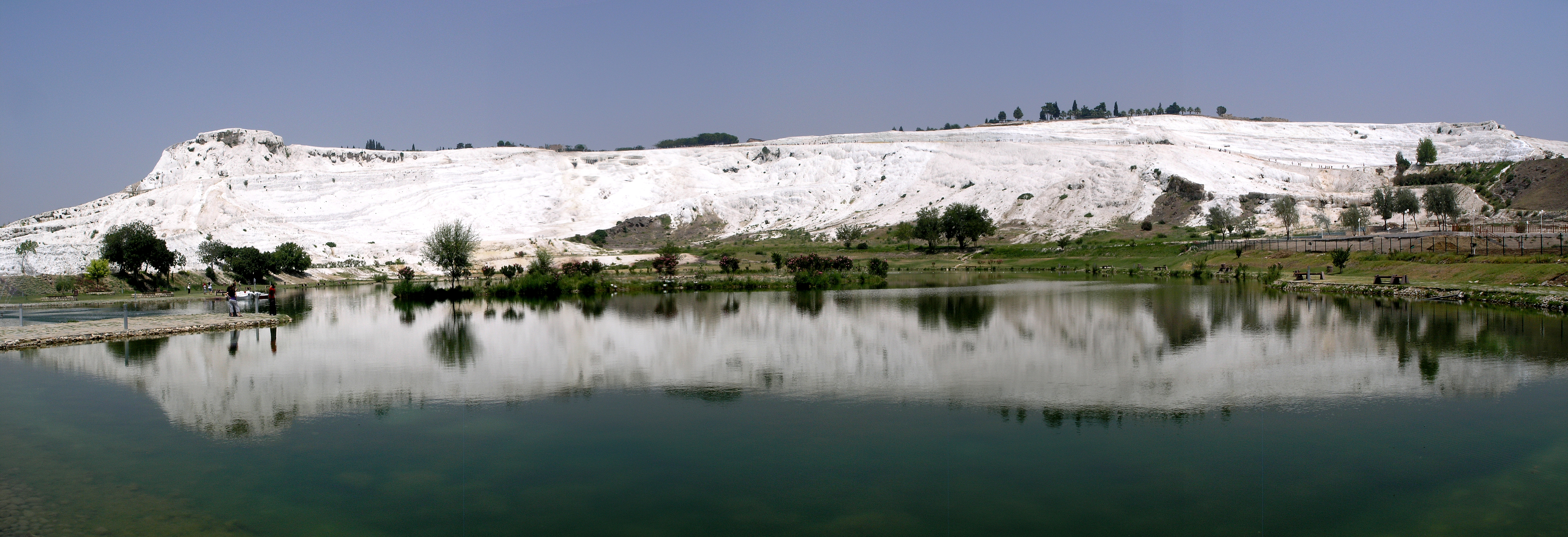 Турция, Денизли, Памуккале